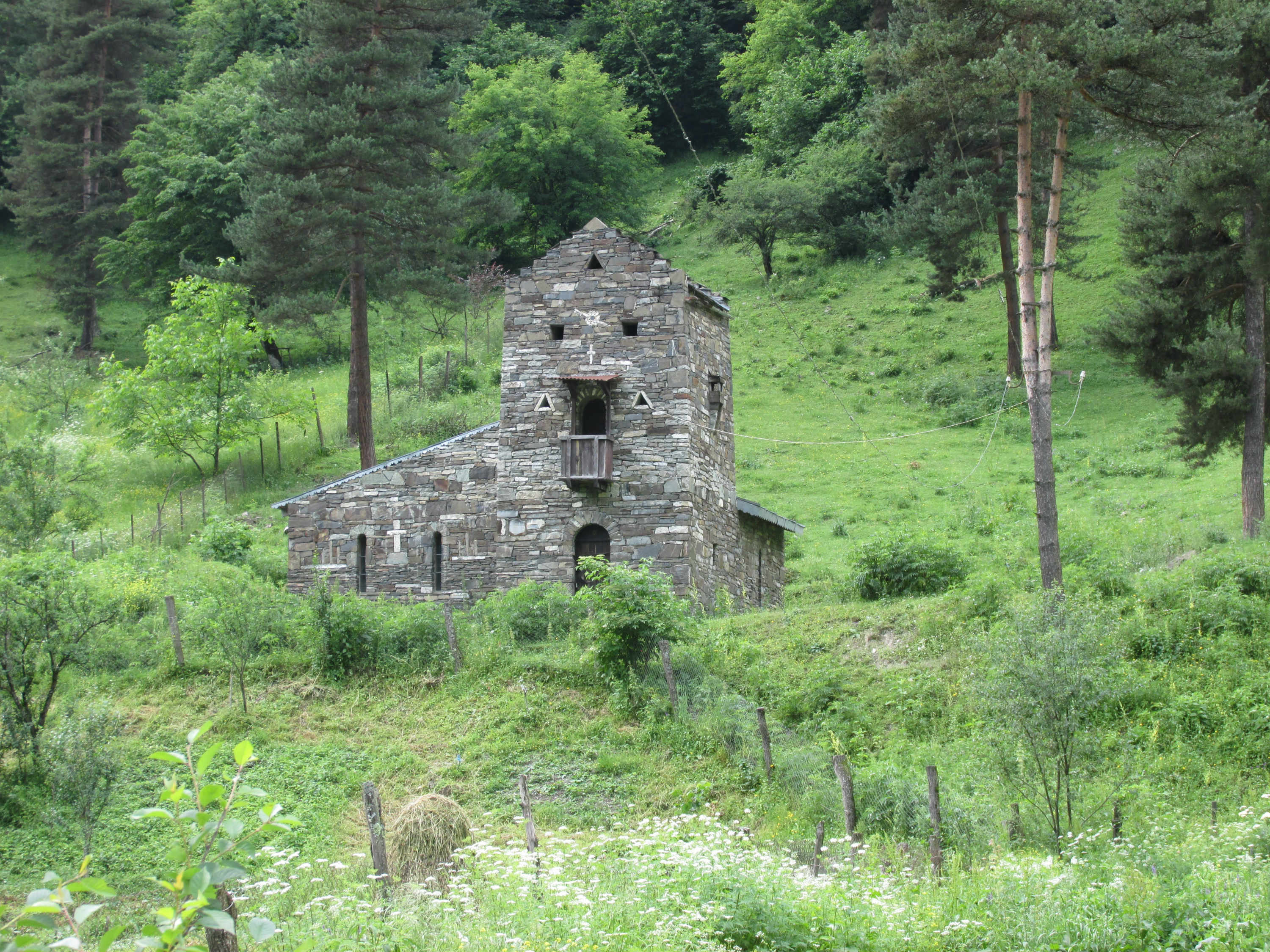 კორშას ეთნოგრაფიული მუზეუმი